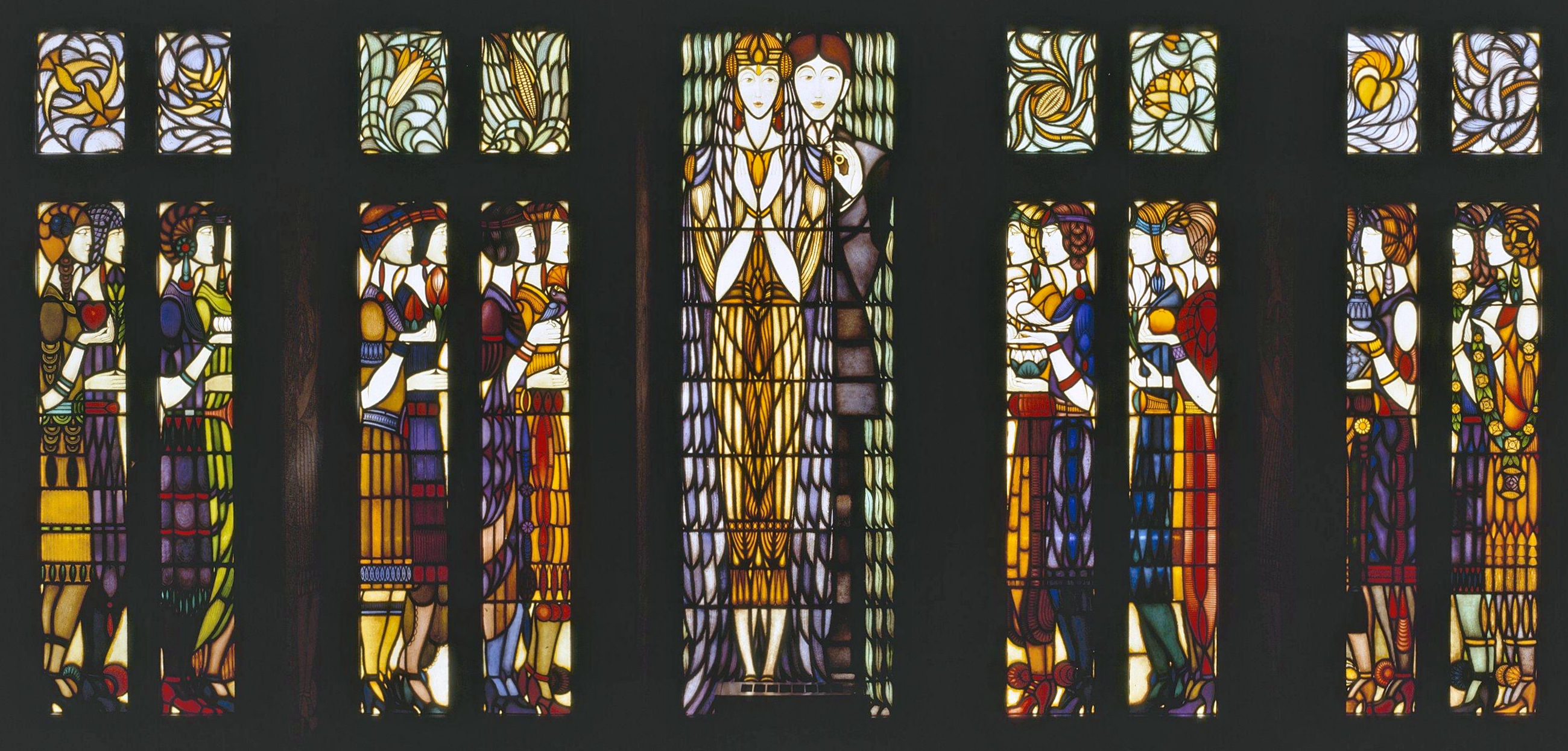 Voormalig Raadhuis: Interieur trouwzaal, overzicht gebrandschilderd glas-in-loodraam (opmerking: Gefotografeerd voor Glas in lood in Nederland 1817-1968)